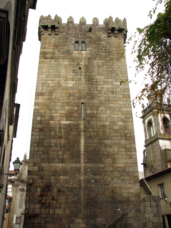 Castelo de Braga, freguesia de São João do Souto, cidade, concelho e distrito de Braga, Portugal: aspecto da torre de menagem.